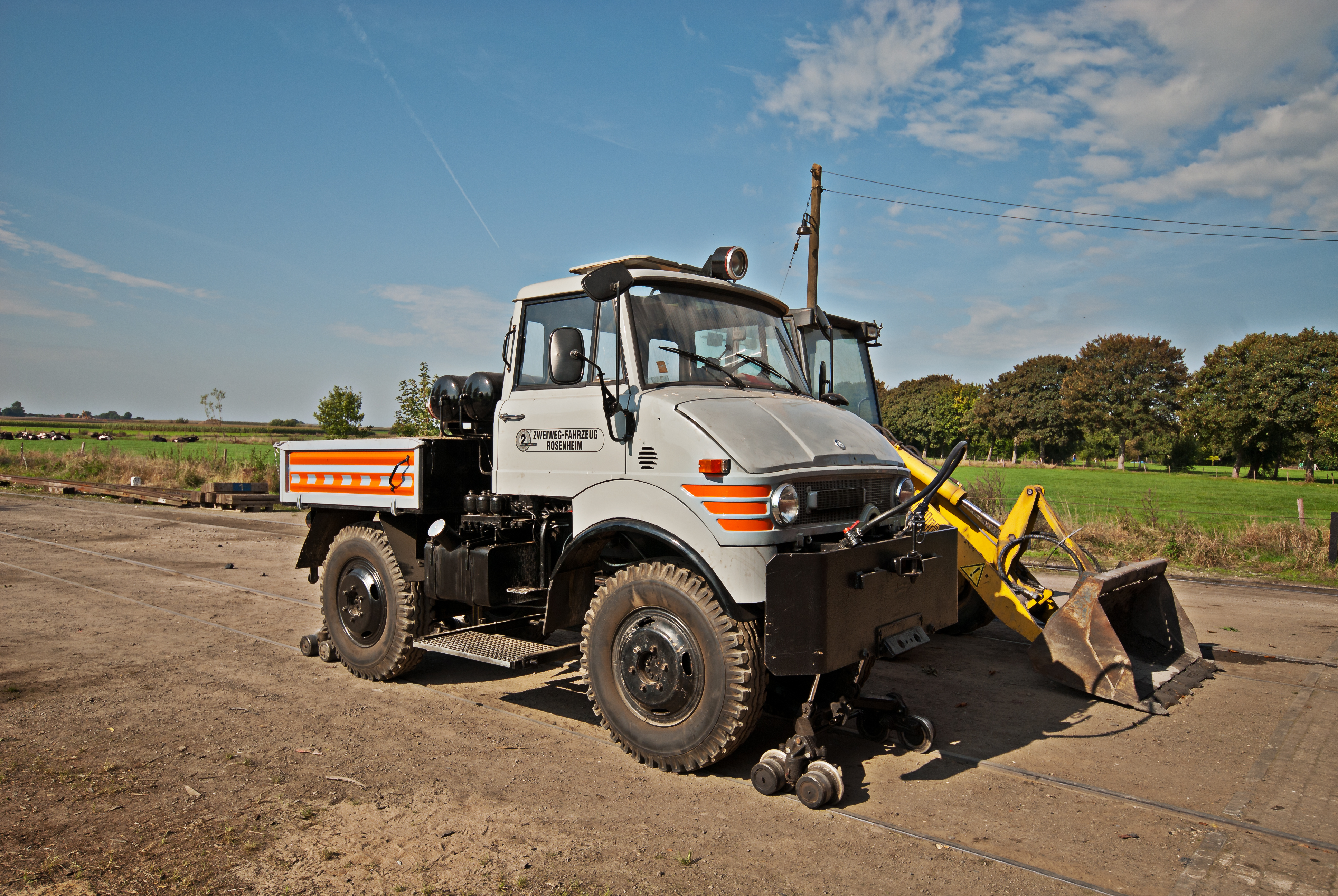 Meterspuriger Zweiwege-Unimog der Selfkantbahn für Einsatz auf Straße und Schiene. Baujahr 1981, Hersteller: Firma Zweiweg Schneider, Rosenheim, unter Verwendung von Mercedes-Benz Unimogteilen. Vorbesitzer: Hersteller. Ausgerüstet mit Druckluftbremsanlage für Wagenzug und Signalisierung gemäß EBAO.